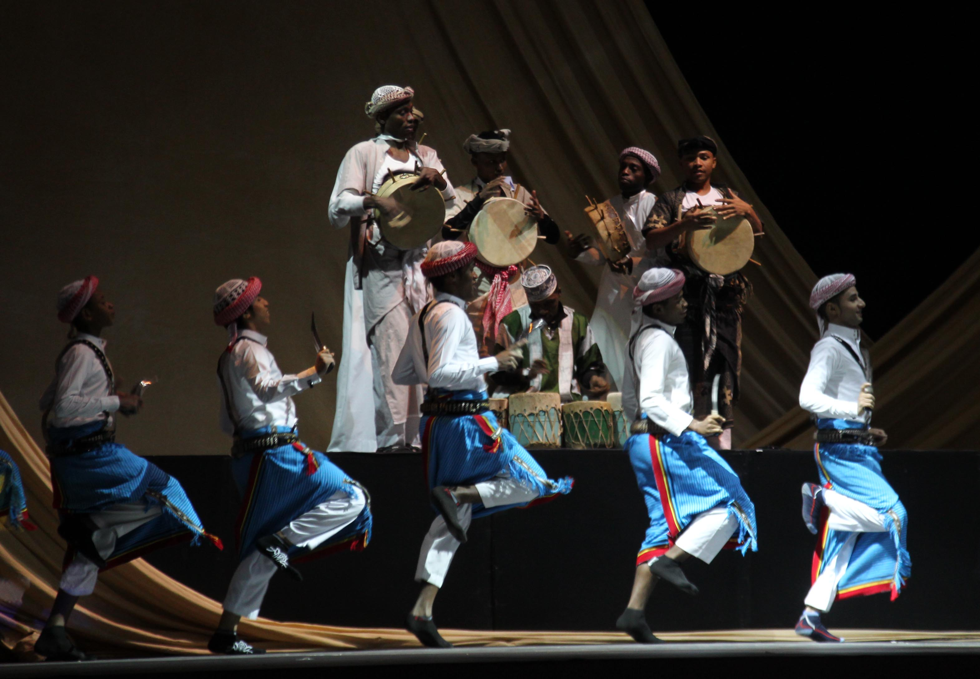 المسرح الخارجي لبرنامج أرامكو السعودية الثقافي 2012